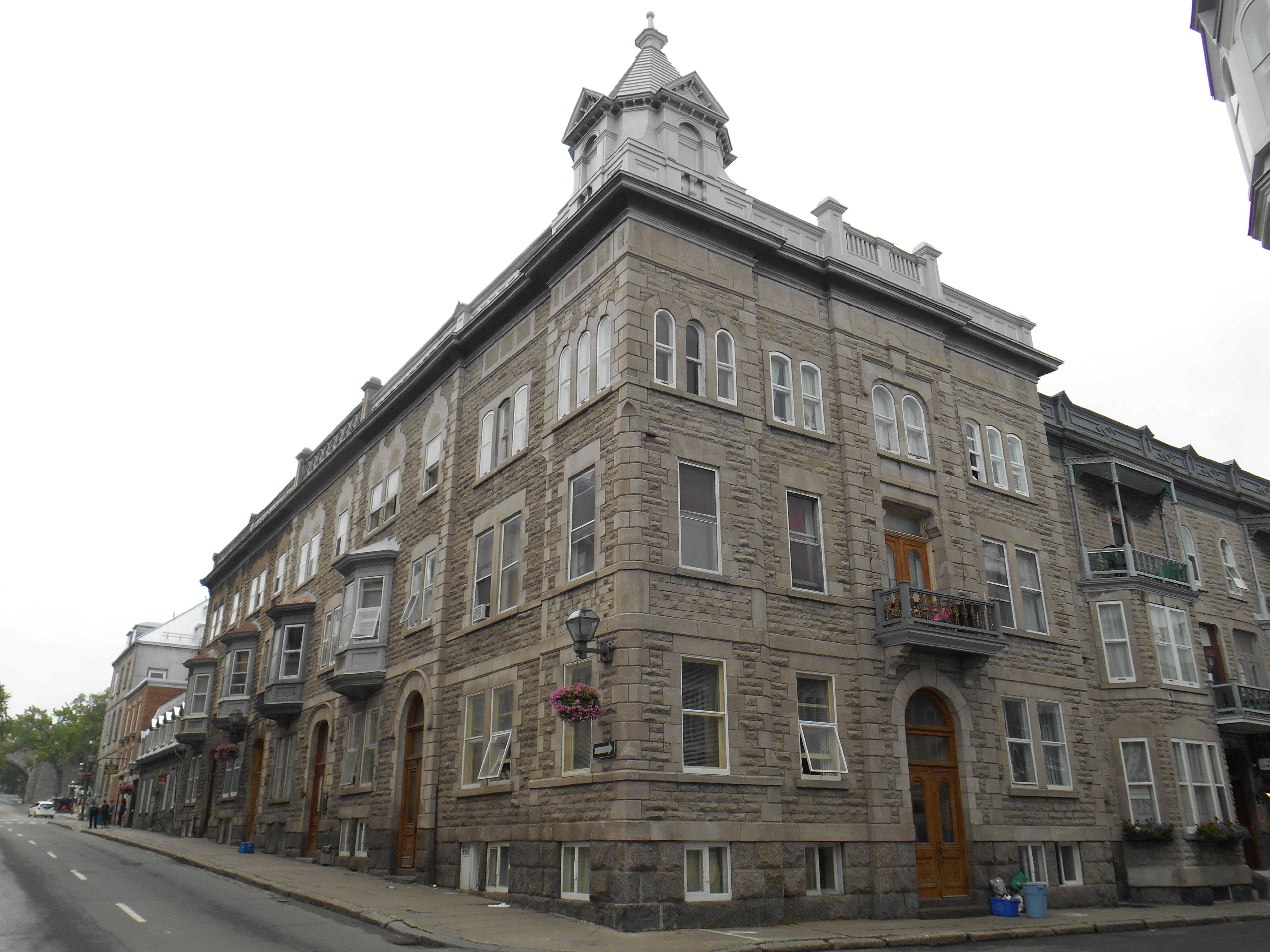 Maisons en rangée Alexandre-Chauveau, sur les rues Saint-Louis et Sainte-Ursule, Québec Les adresses, de gauche à droite : 84, 82, 80, 78, rue Saint-Louis, 70, 68-70 1/2, rue Sainte-Ursule